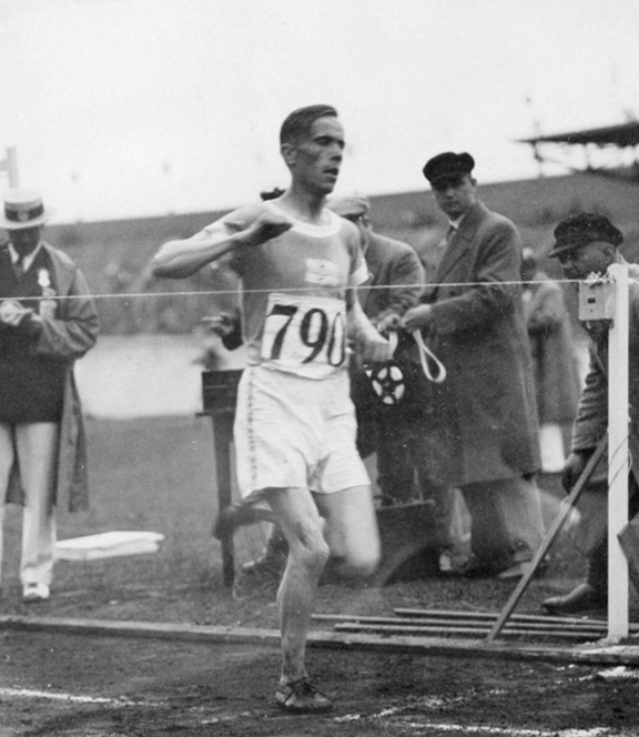 Olympische Spelen 1928 Amsterdam, Nederland : De Fin T.A. Loukola passeert als eerste de finish tijdens de finale van de 3000 meter steeplechase.